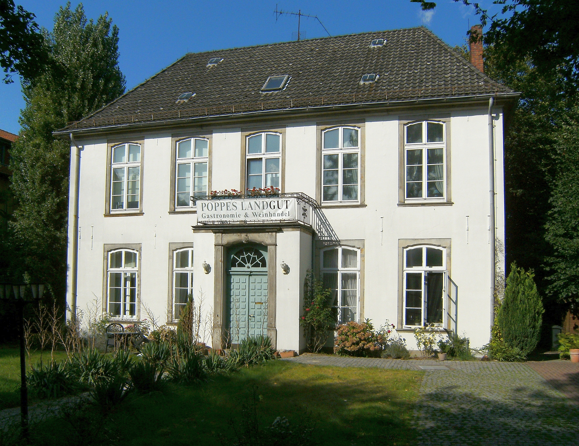 Poppes Landhaus in Bremen, Arsterdamm 10.Das abgebildete Objekt ist ein geschütztes Kulturdenkmal in der Freien Hansestadt Bremen, mit der Nr. 0091,T beim Landesamt für Denkmalpflege registriert.